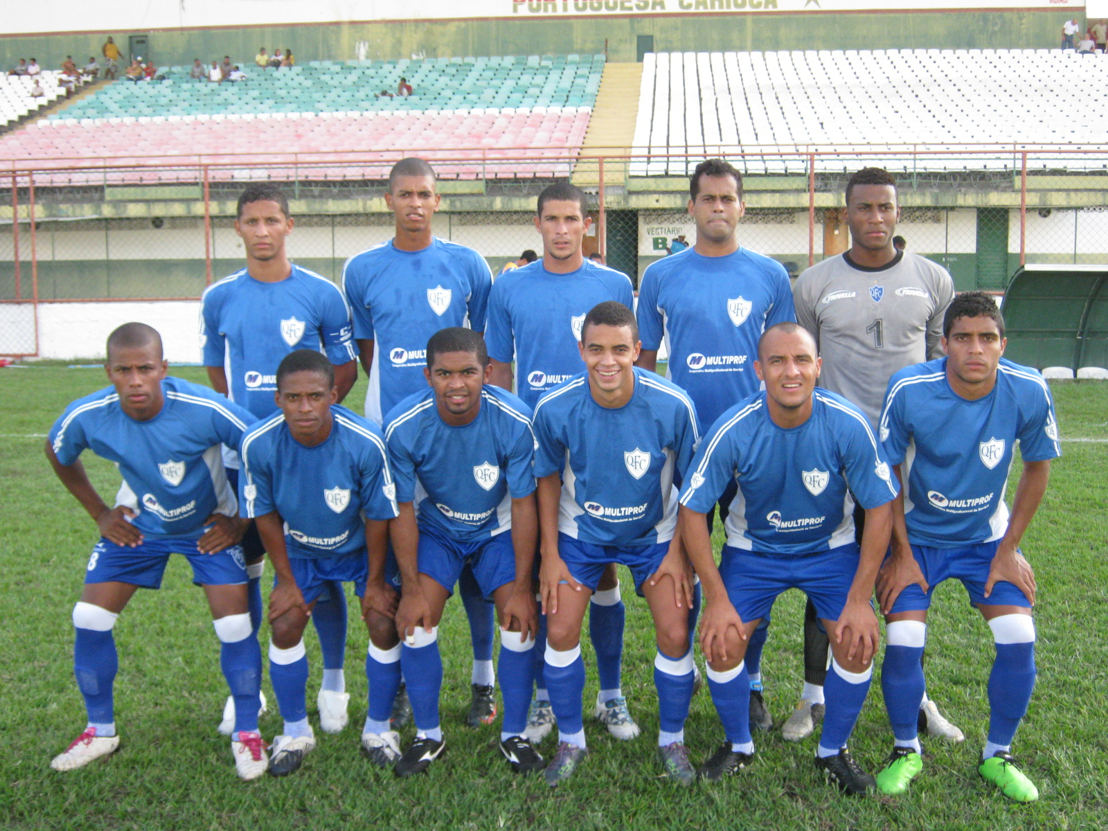 Equipe profissional do Quissamã em 2011.